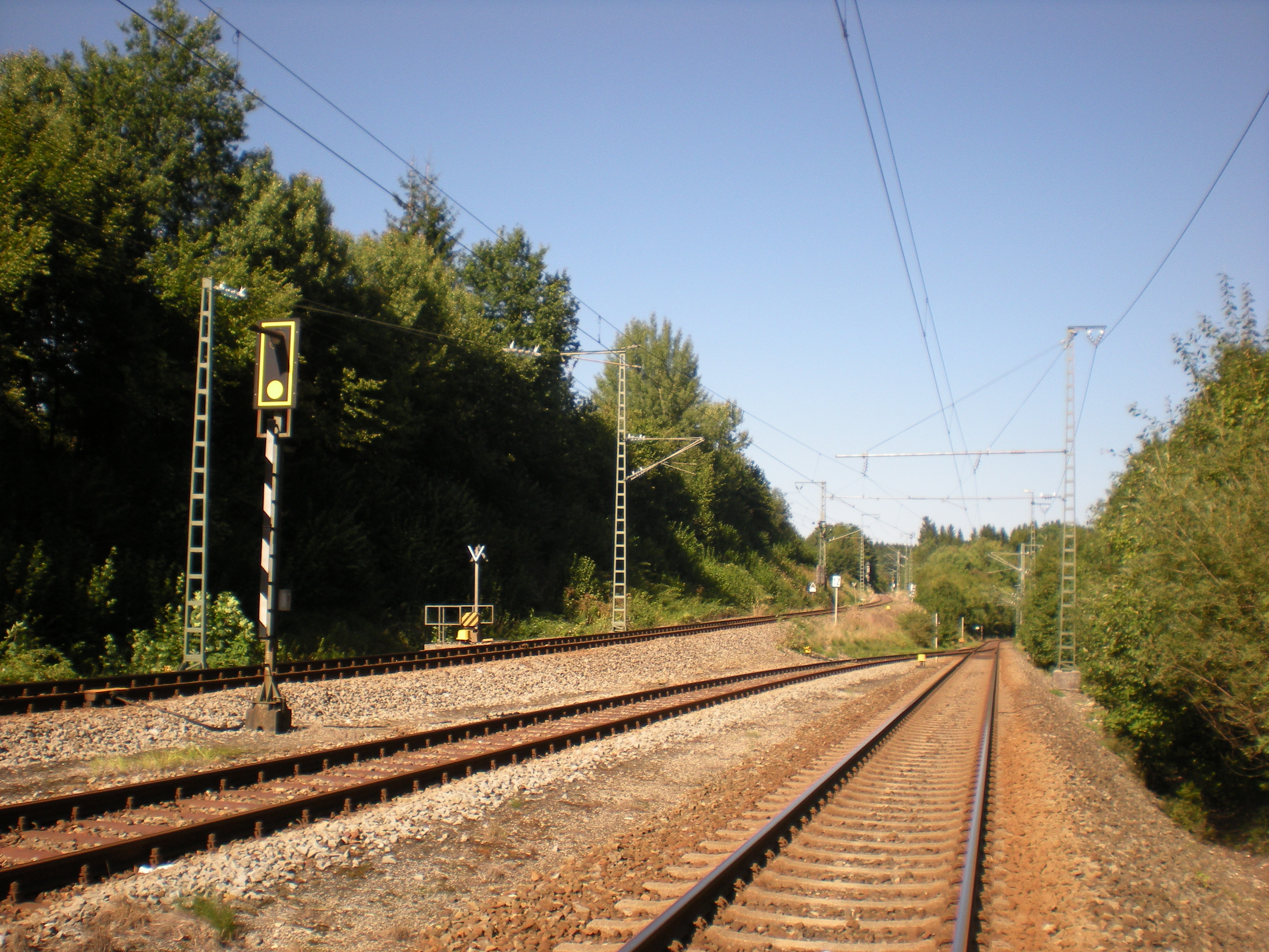 Verzweigung der Bahnstrecke München-Giesing–Kreuzstraße (links) und der Mangfalltalbahn (rechts) am Nordkopf des Bahnhofs Kreuzstraße